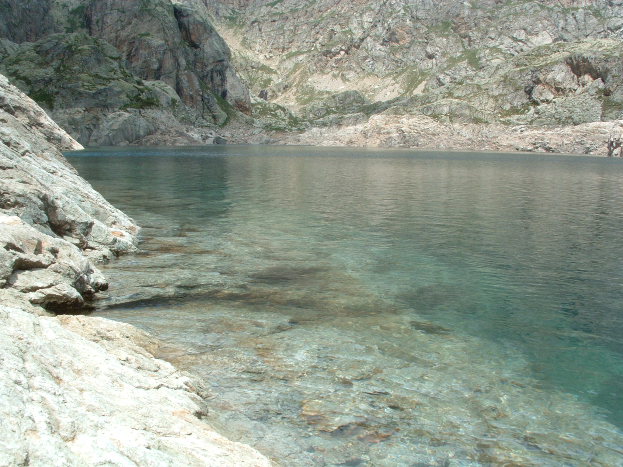 Lago Nero, Orobie.